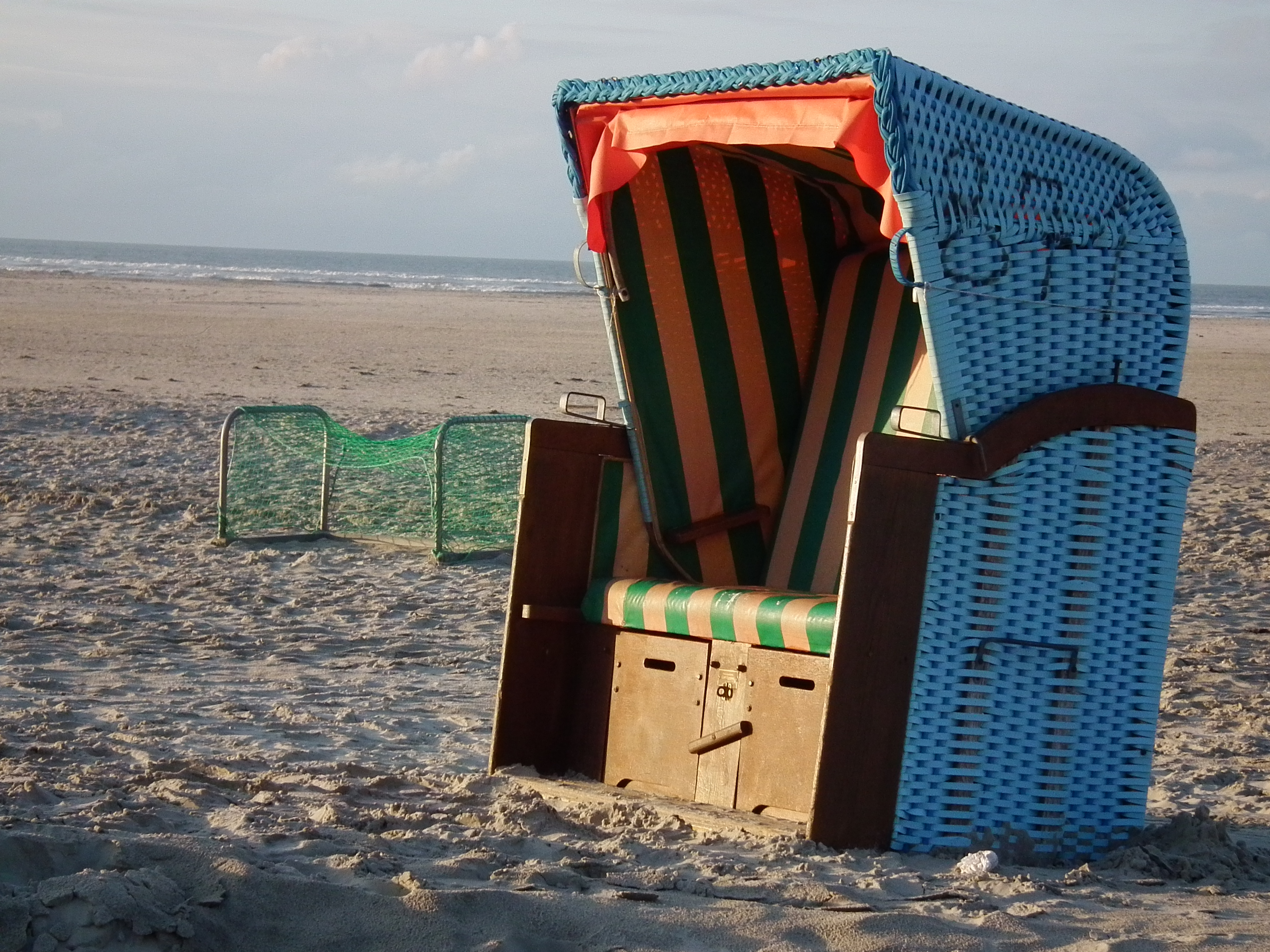 Blauer Strandkorb auf der ostfriesischen Nordseeinsel Juist (Niedersachsen, Deutschland) im Schein der untergehenden Sonne